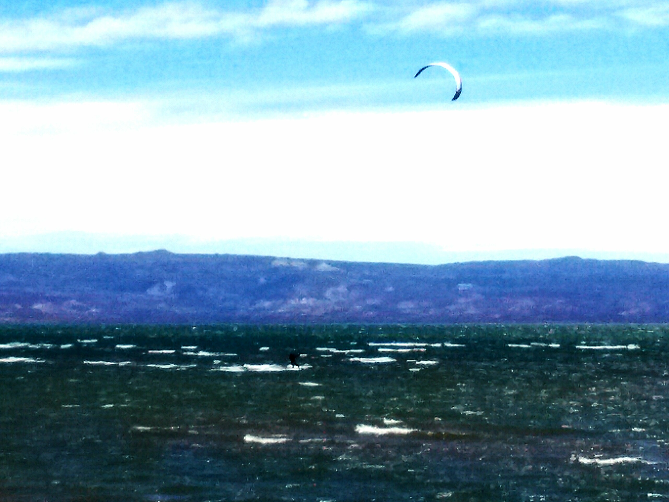 Musters lake